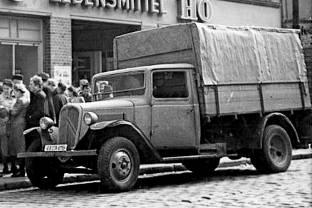 Citroën Typ 32 vor einem Geschäft in Berlin-Köpenick am 17. Oktober 1950